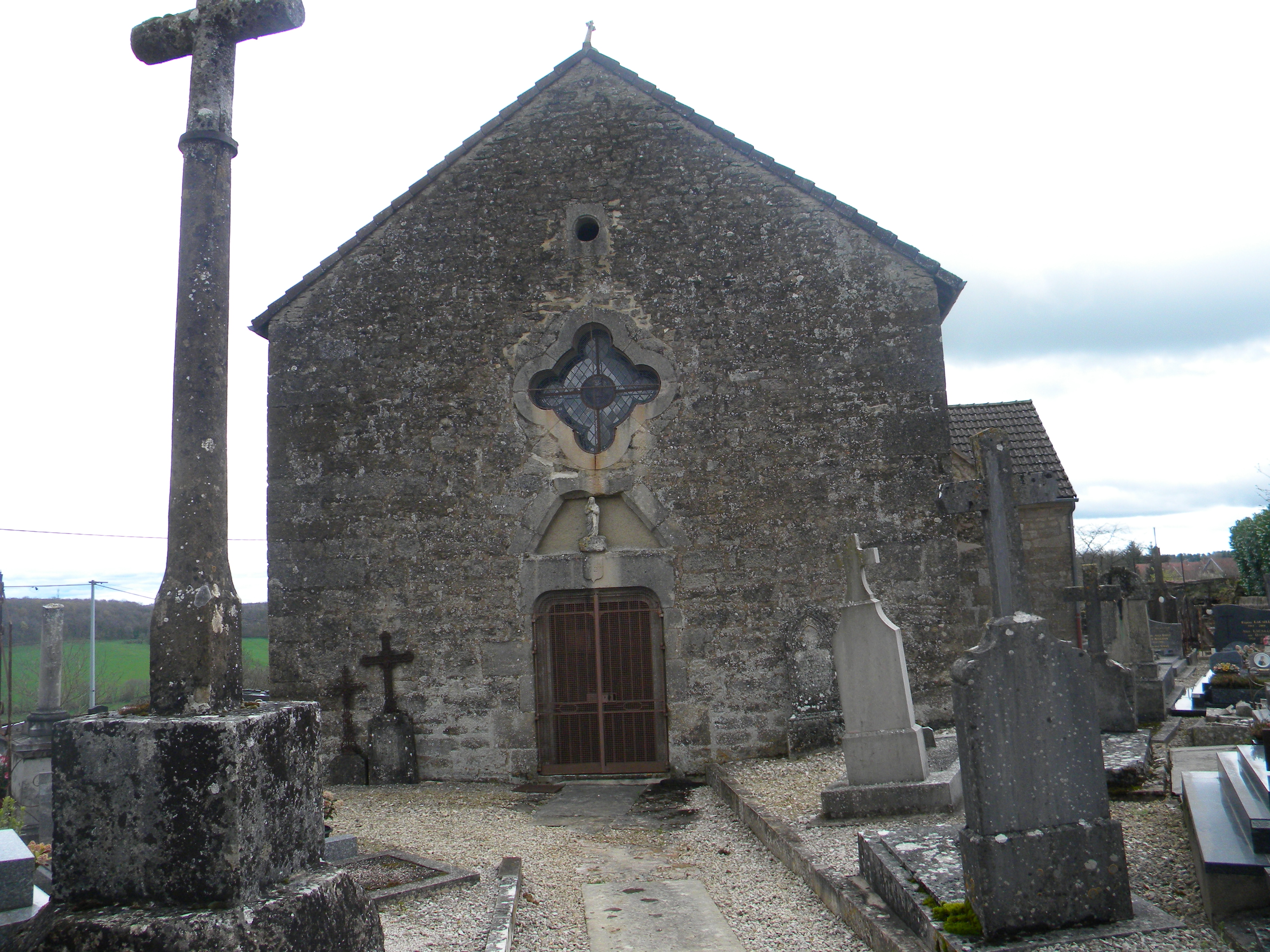 Kirko de Civry